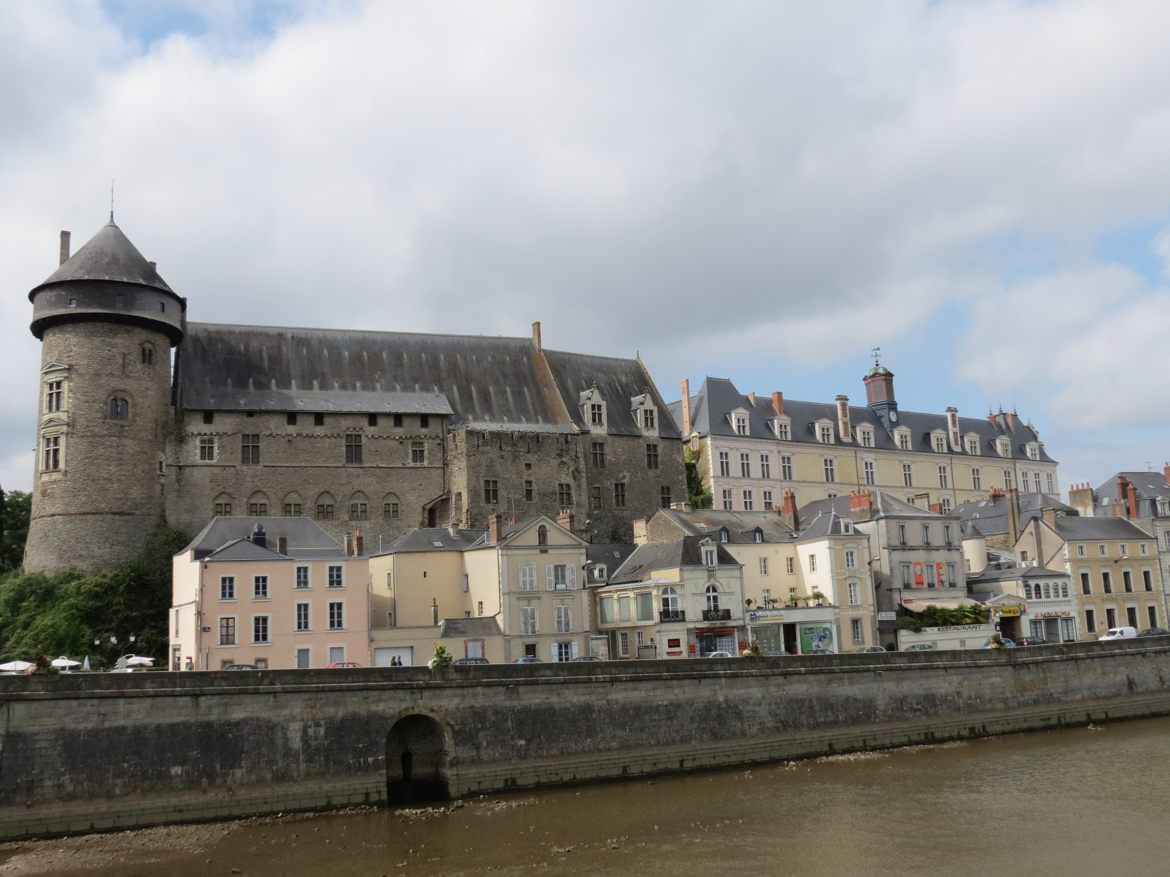 Château, Laval, Mayenne, Pays de la Loire.